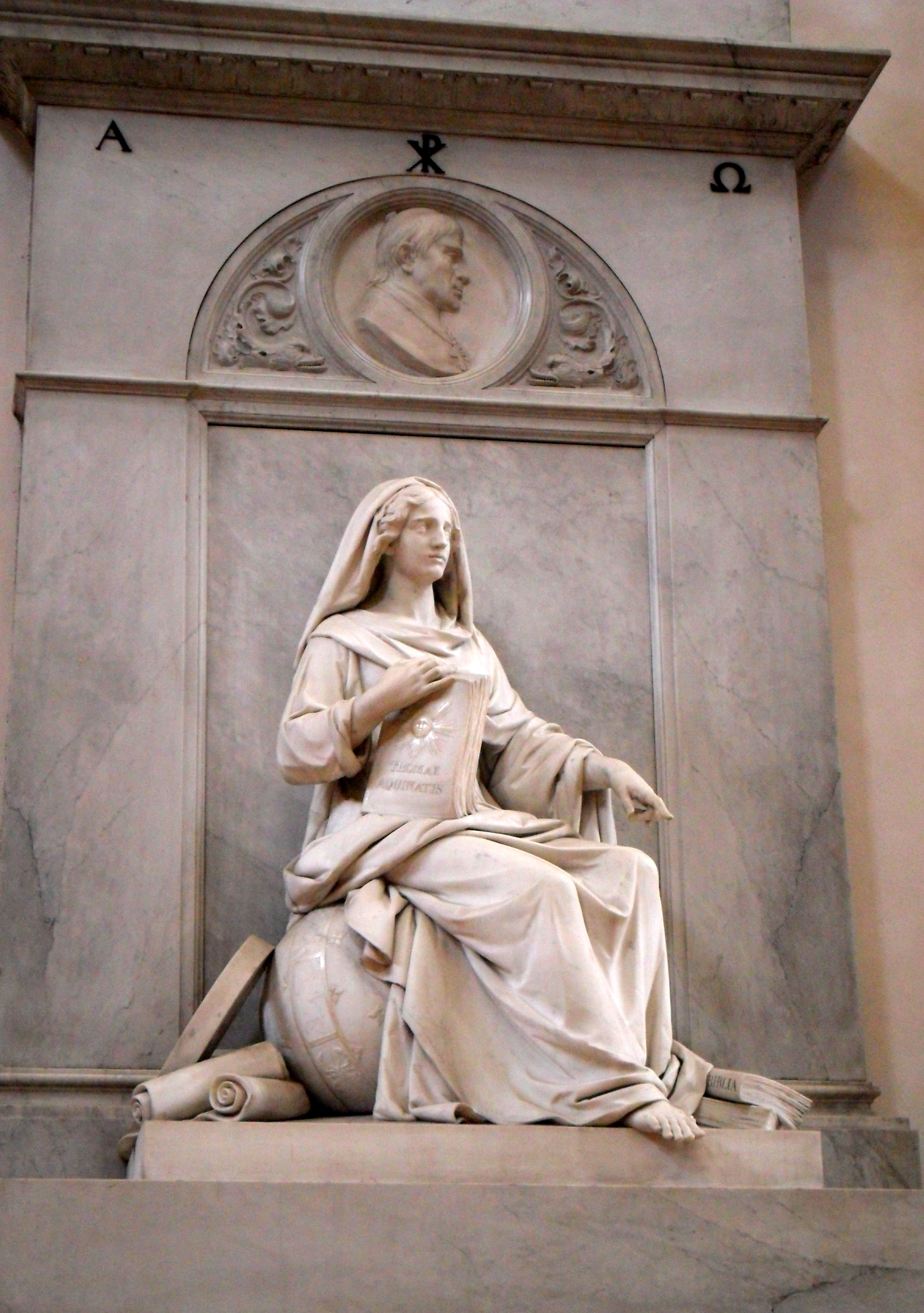 Tomba del Vescovo Ferrari (1855) Duomo Nuovo di Brescia